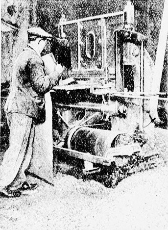 Vue d'une machine à fabriquer les confettis. Extraite de l'Almanach pratique du "Petit Parisien" pour l'année 1912, paru fin 1911, page 90.